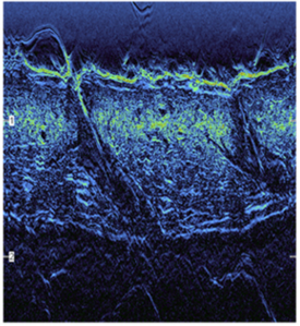 Folicule